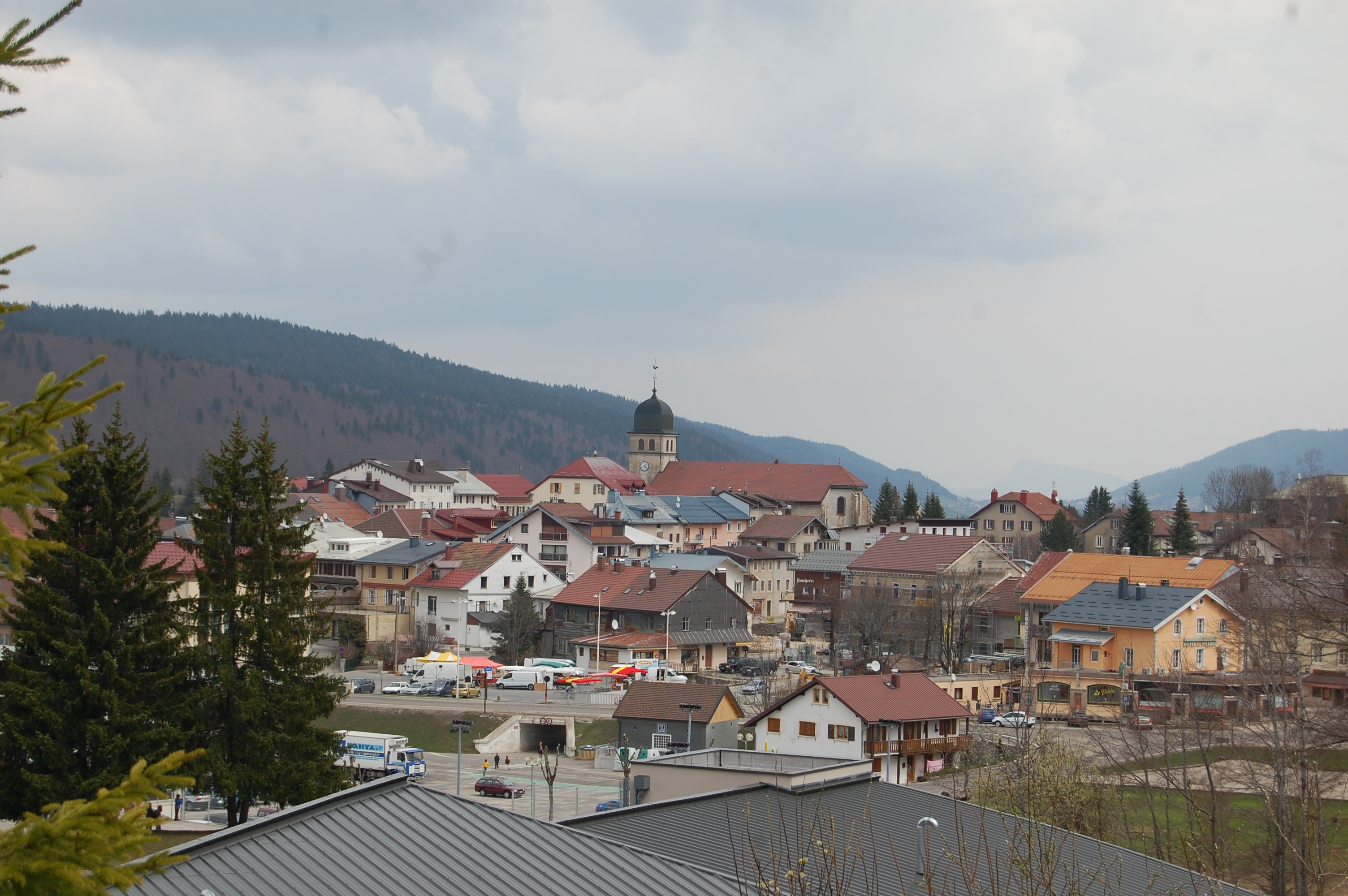 villages des rousses